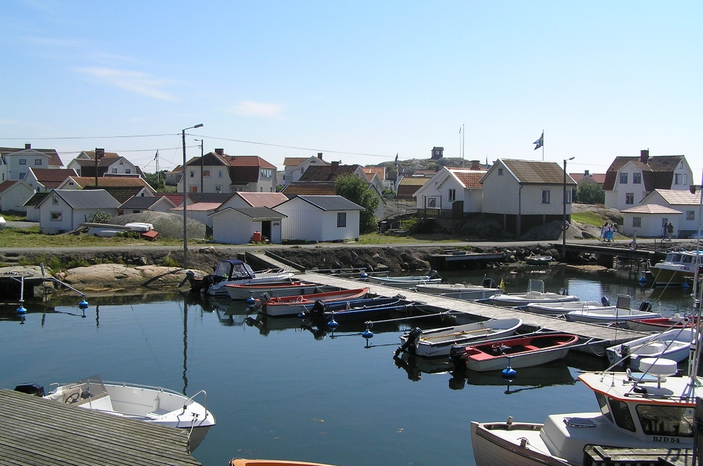 Hans Gamborg, 2005 Vrångö hamn, Göteborgs södra skärgård